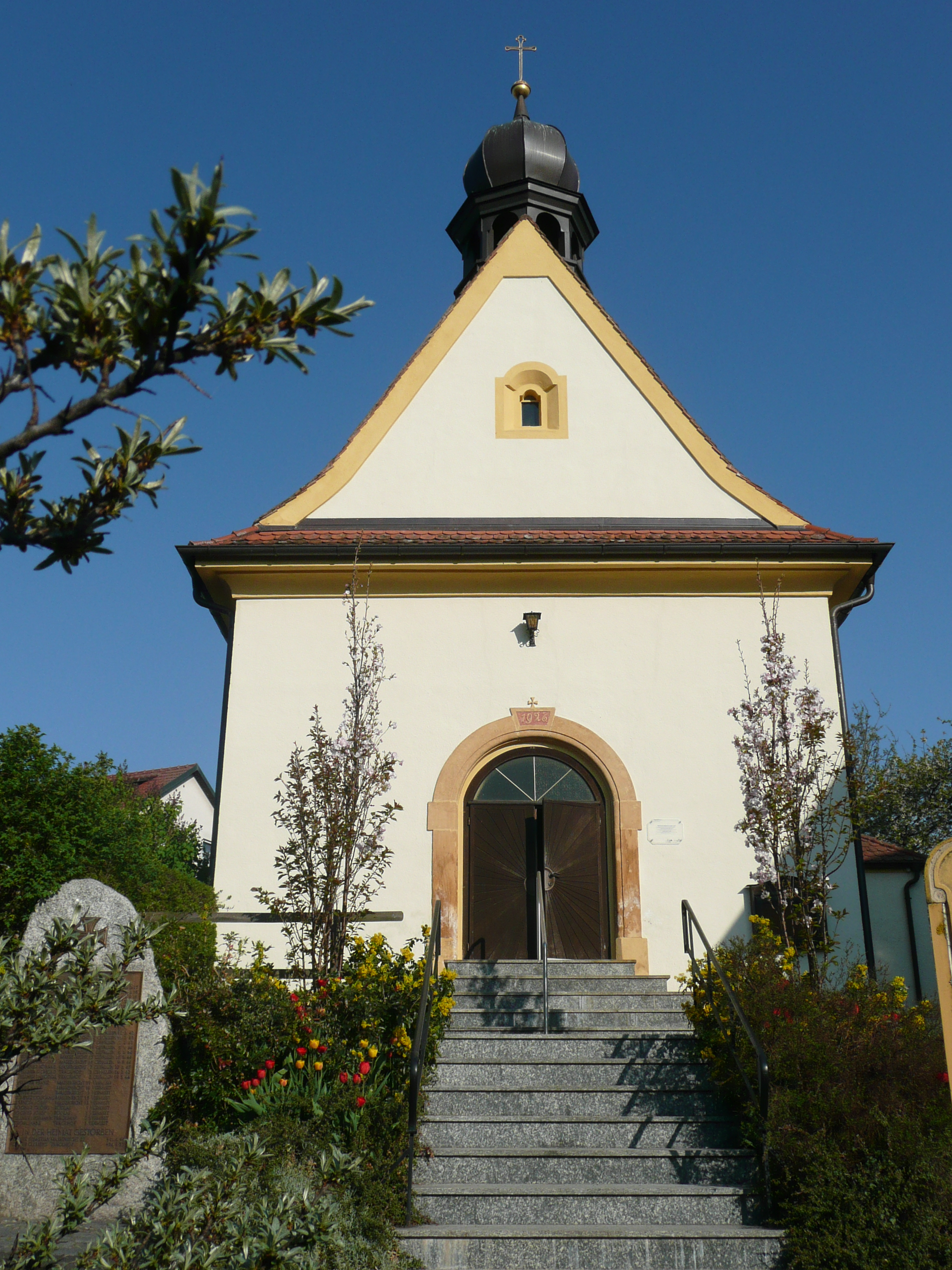 Dorfkirche Massenricht Frontansicht mit Kriegerdenkmal